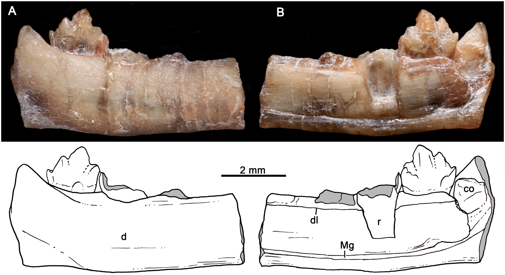 Santacruzgnathus abdalai, holotype UFRGS-PV-1121-T. Partial right lower jaw with complete crown of last postcanine in lateral (A) and medial (B) views. Gray indicates broken areas.